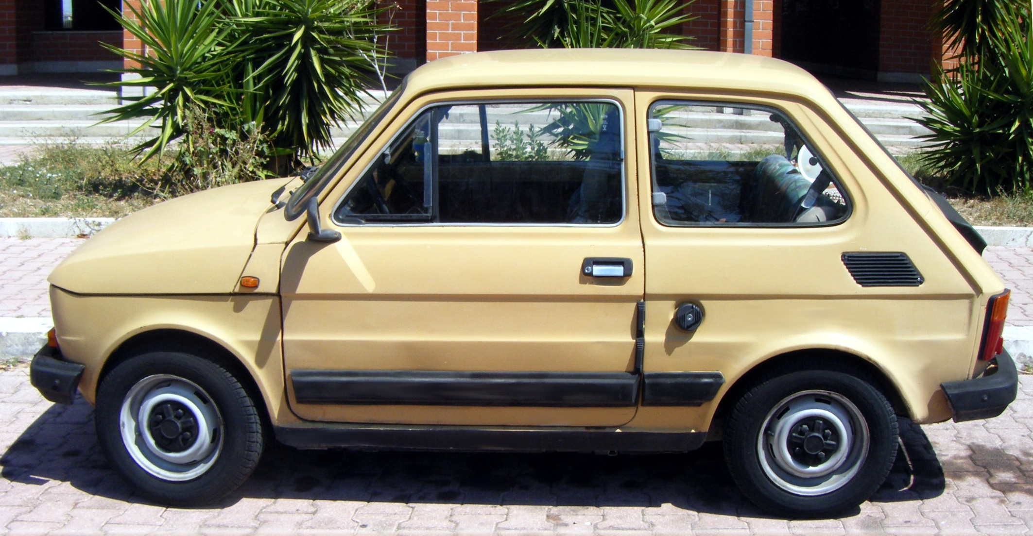 Fiat 126